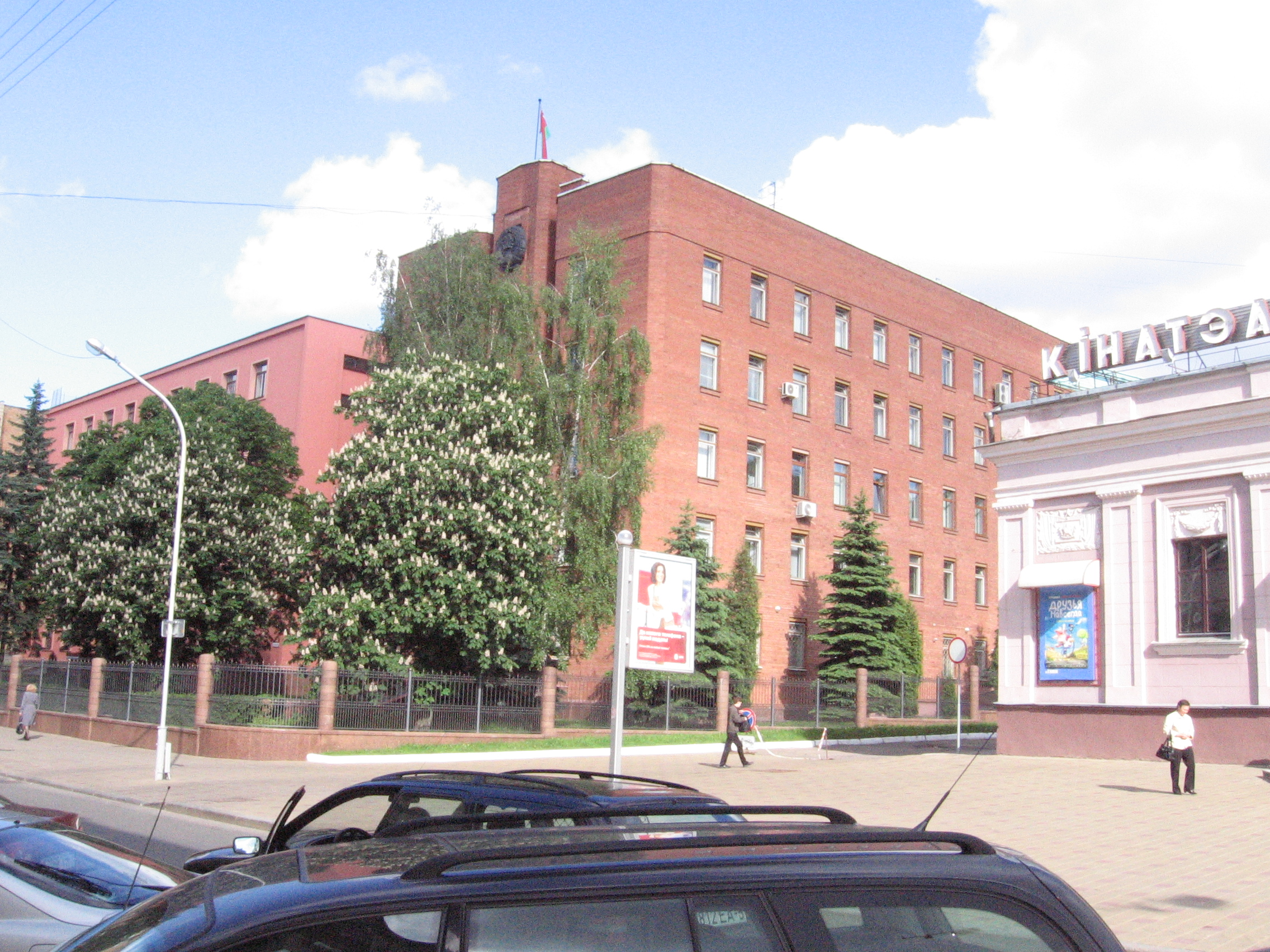 Минск, здание генеральной прокуратуры (ул. Интернациональная, 22)